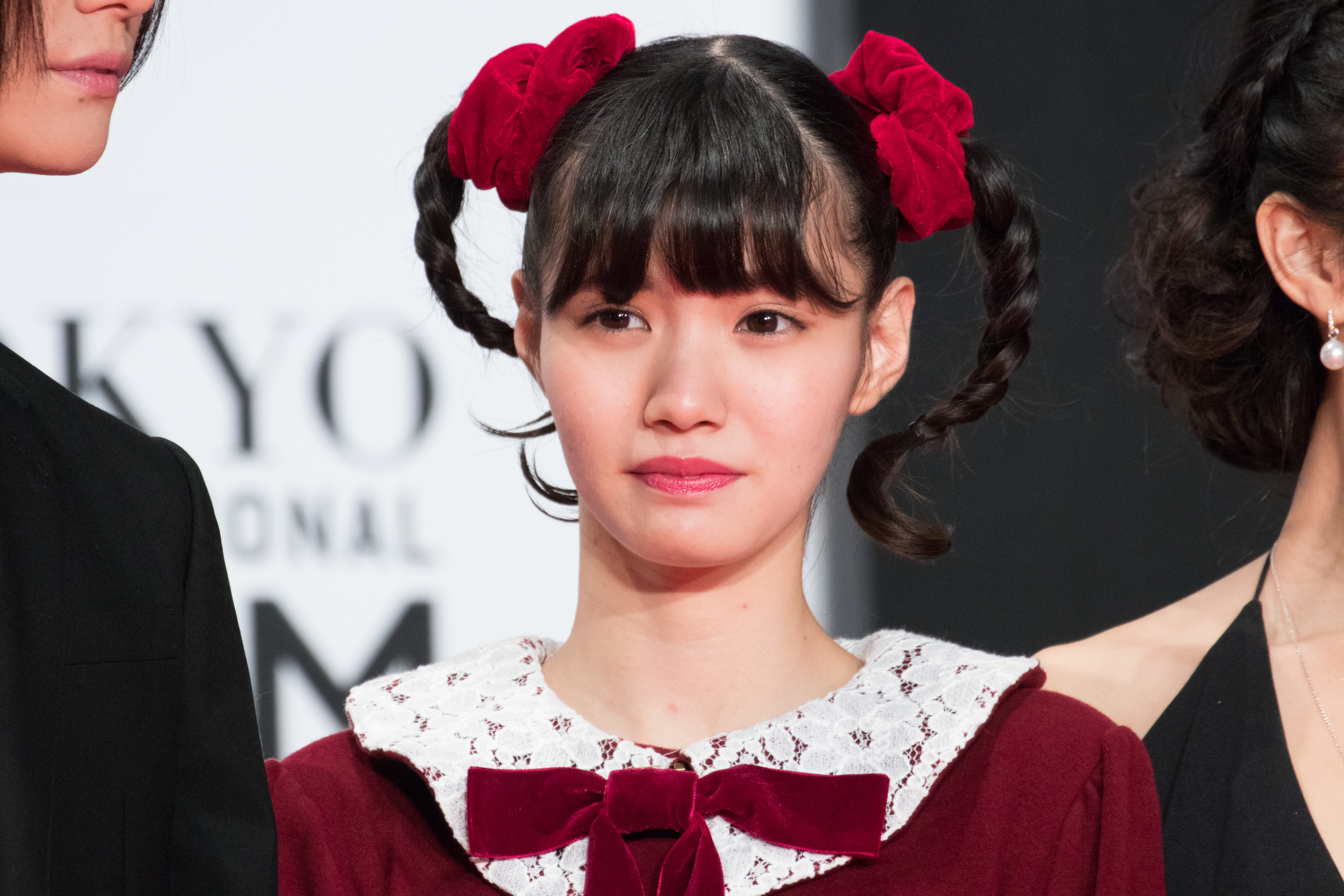 第29回 東京国際映画祭 オープニングセレモニー 荒川ちか (星くず兄弟の新たな伝説)